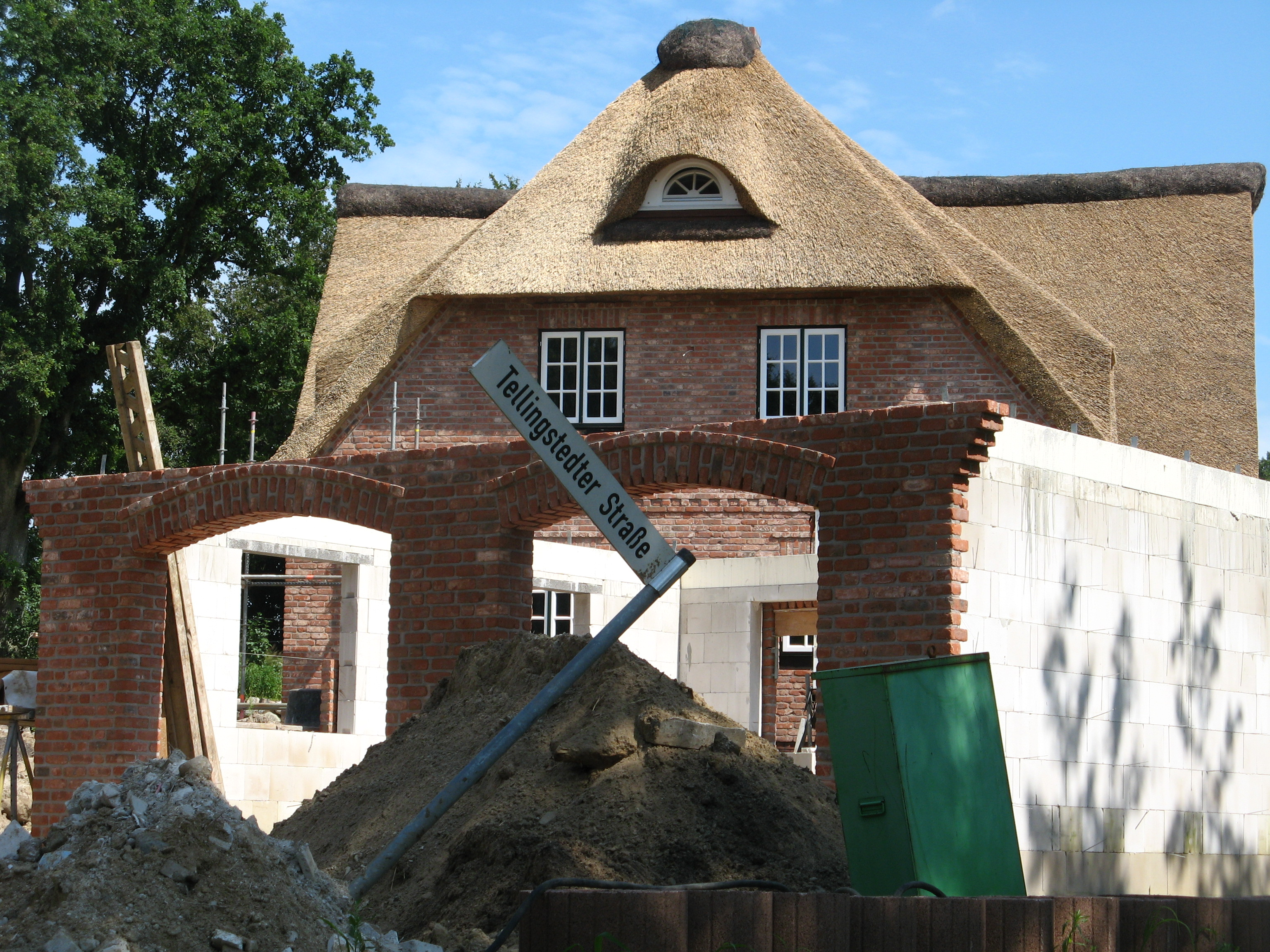 Street sign in Dörpling